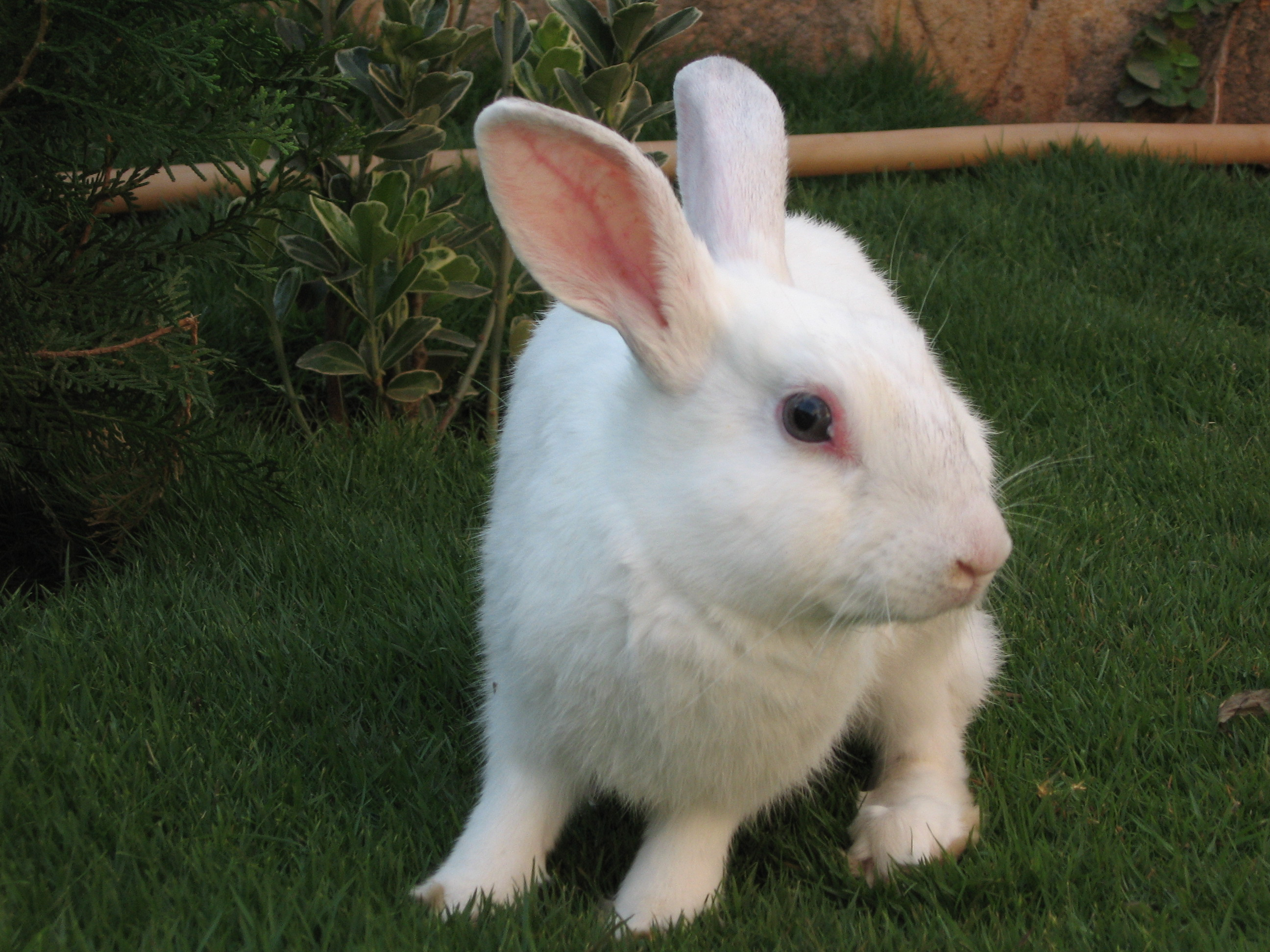 വളർത്തുമുയൽ ആണ് ഇത്